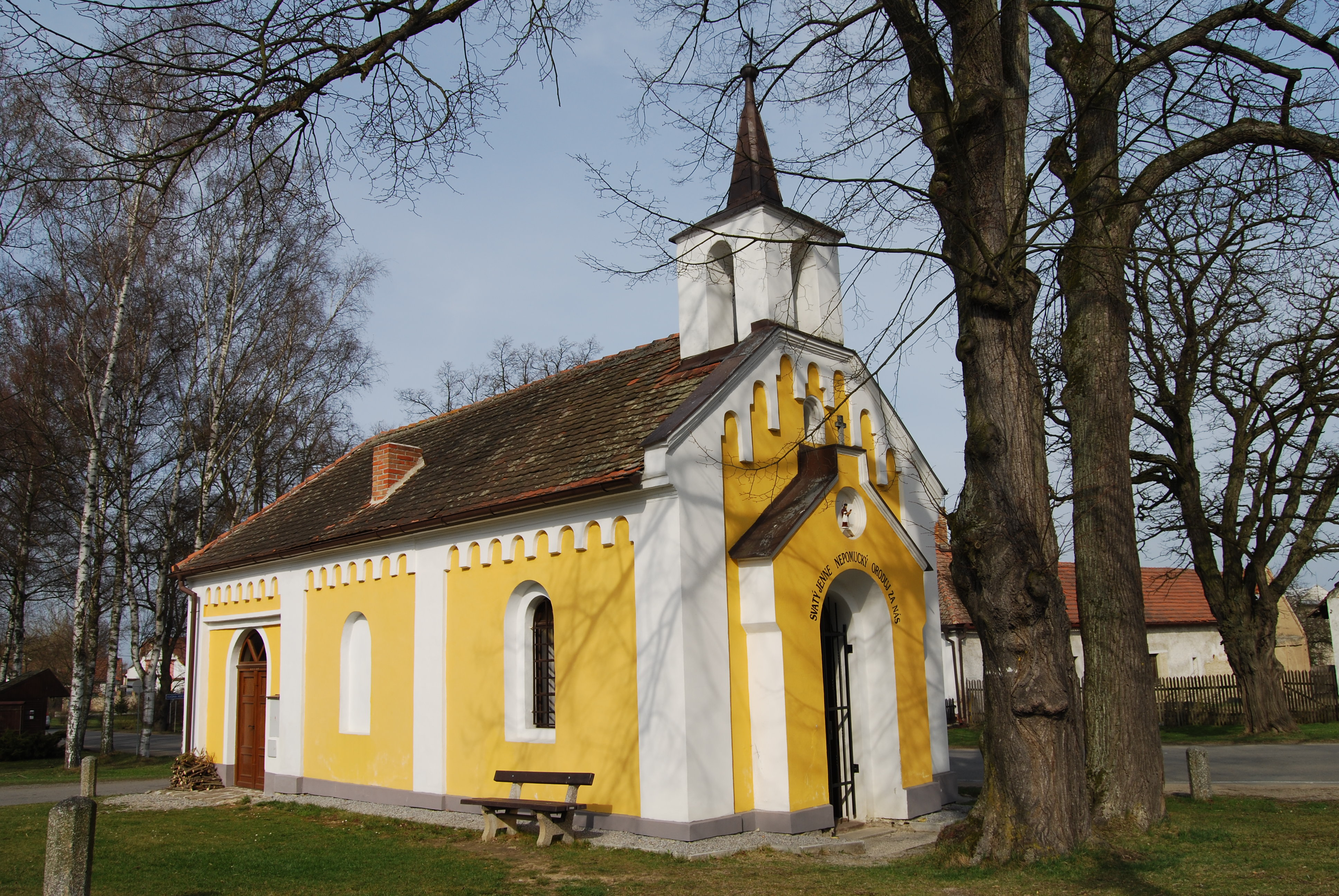 Boční pohled na kapli. Návesní kaple zasvěcená sv. Janu Nepomuckému z roku 1884. Záhoří (okres Písek). Česká republika.